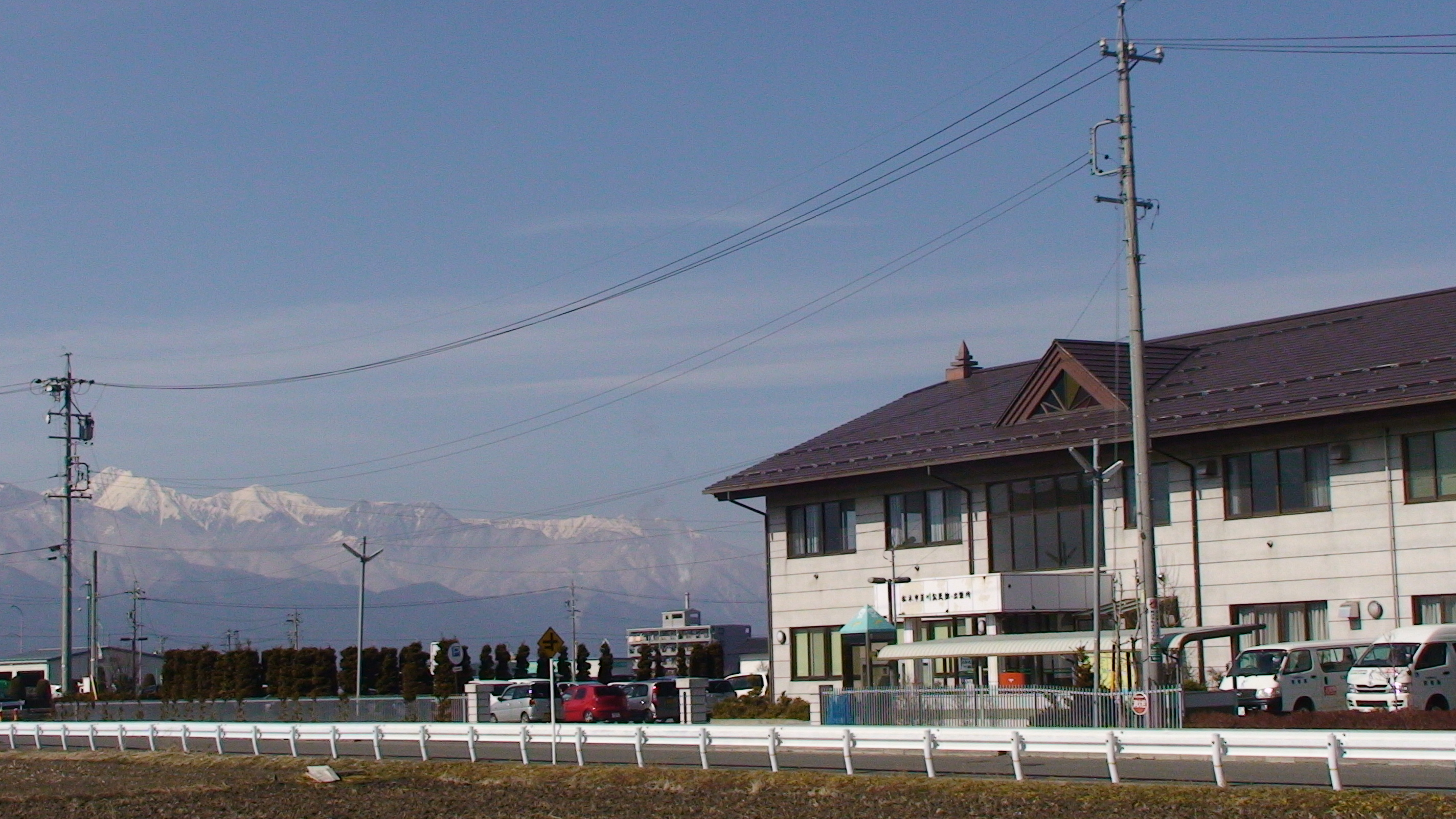 Matsumoto city hall Yoshikawa branch